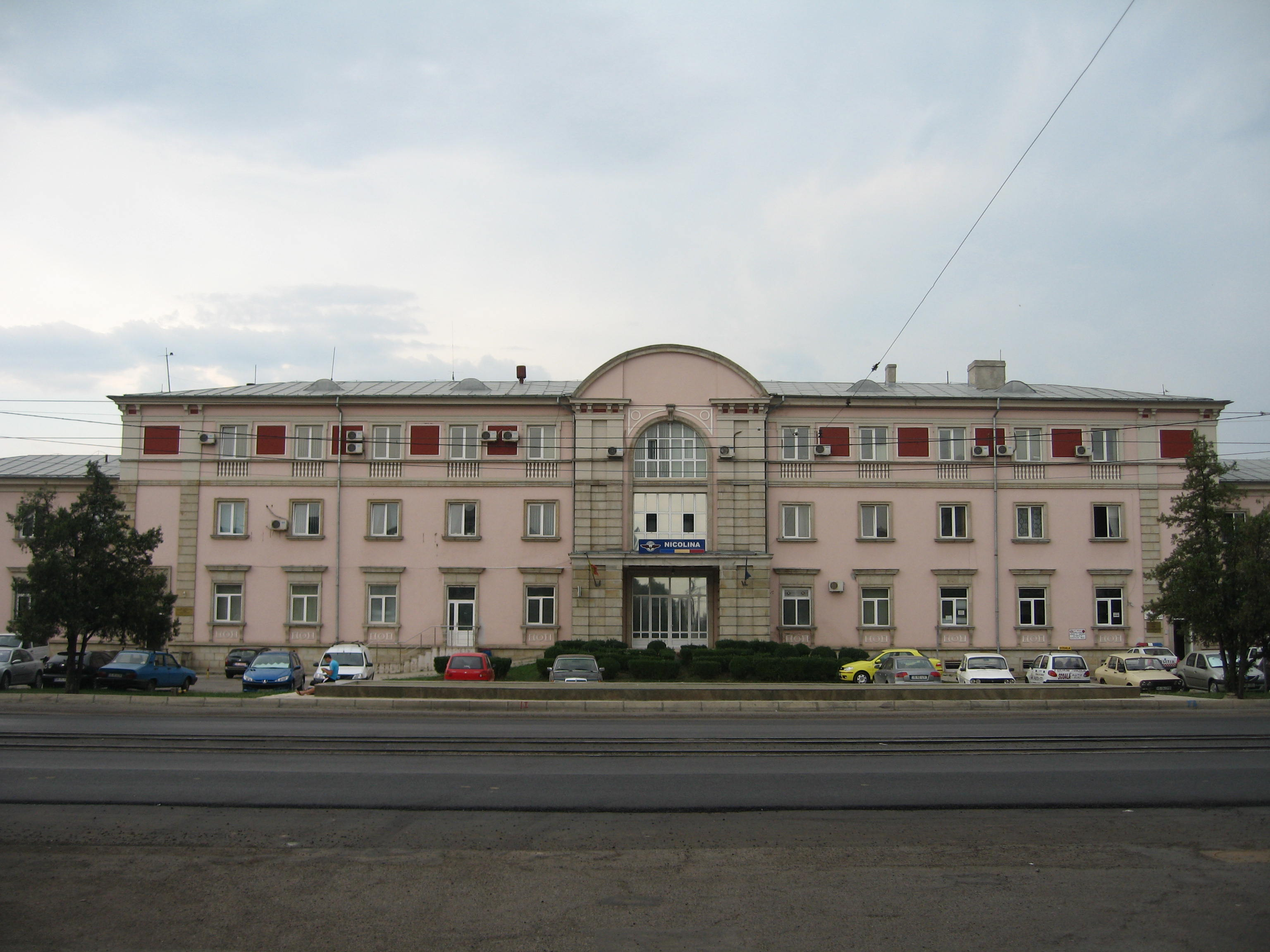 Gara Internaţională Nicolina